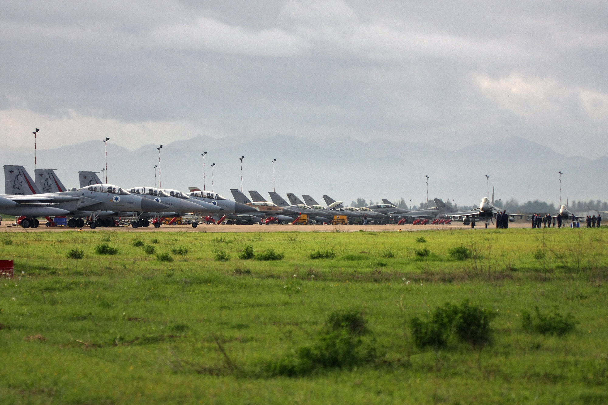 November 18, 2010. The Israel Air Force and the Italian Air Force conclude an extensive, two-week exercise in Sardinia. For more information, see: wp.me/ppbEs-13D חיל האוויר הישראלי וחיל האוויר האיטלקי מסכמים תרגיל בן שבועיים בסרדיניה, אשר באיטליה.